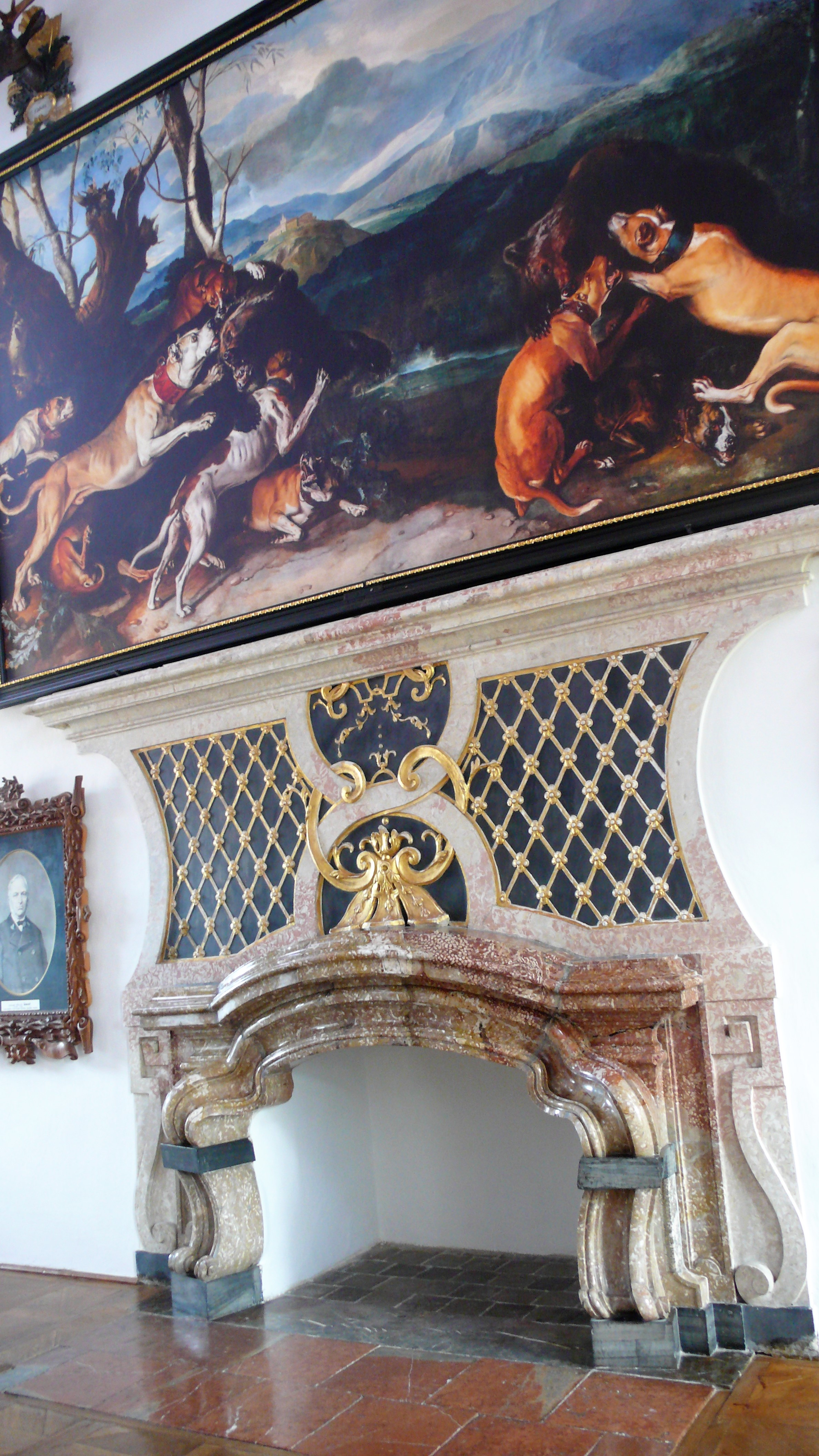 Velký sál zámku Ohrada, krb s obrazem Štvanice na medvědy od Johanna Georga de Hamiltona